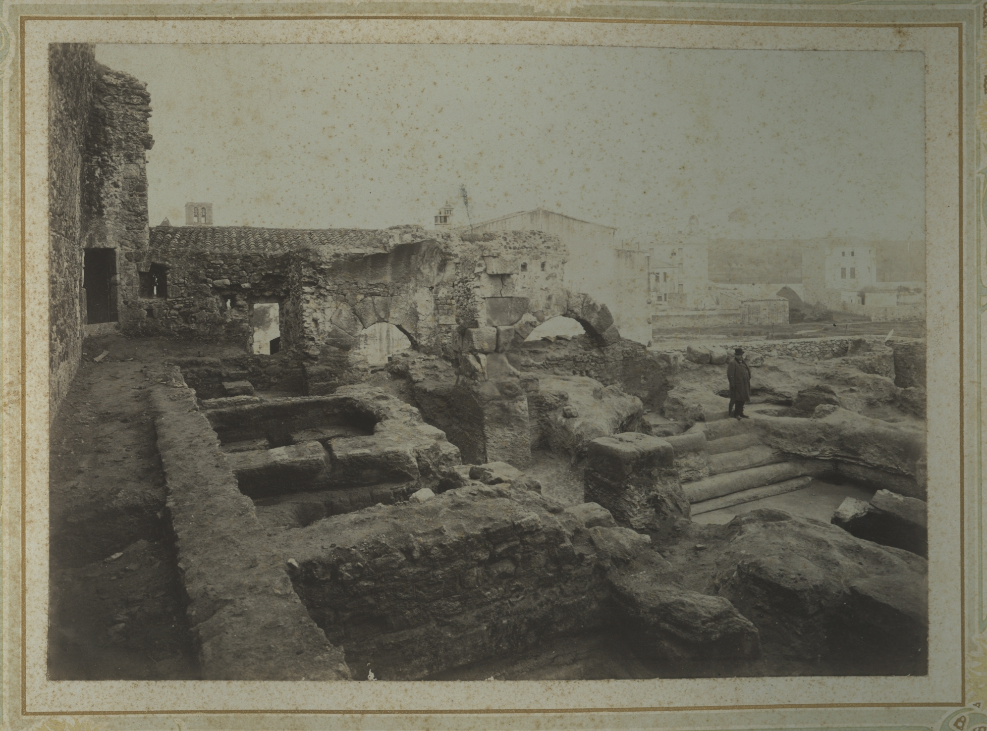 Roman Thermal Baths in Caldes de Malavell, Spain.